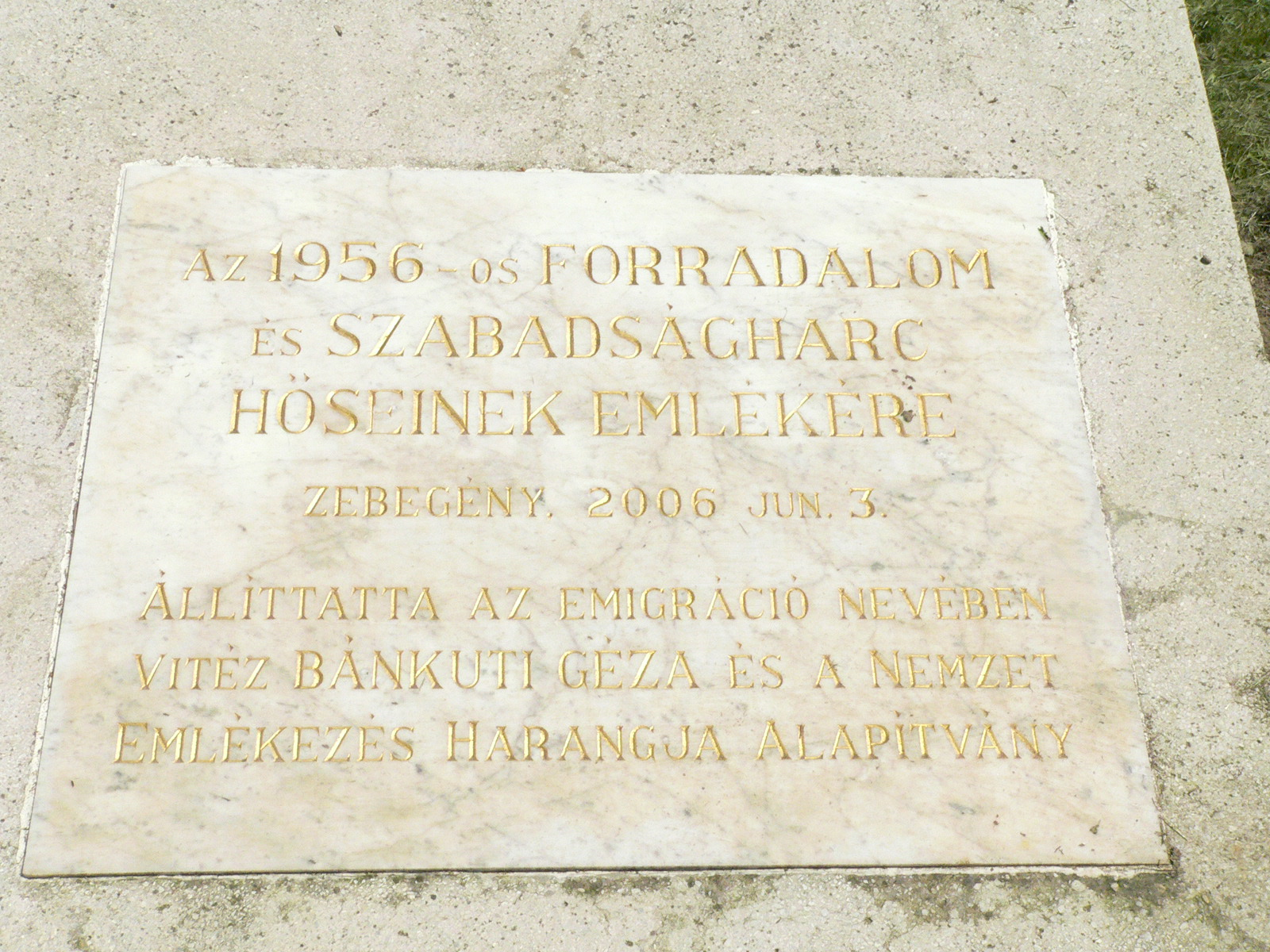 Zebegény, Országzászló és hősi emlékmű, az 1956-os forradalom emléktáblája